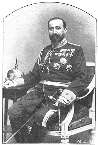 Retrato de Venancio López de Ceballos, obra del fotógrafo Kaulak, recogido en la revista española La Ilustración Española y Americana.